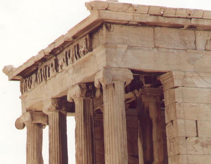 Detail van de Nikè-tempel (Athene, Akropolis)